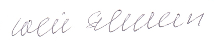 Signatur von Loki Schmidt, Hamburg